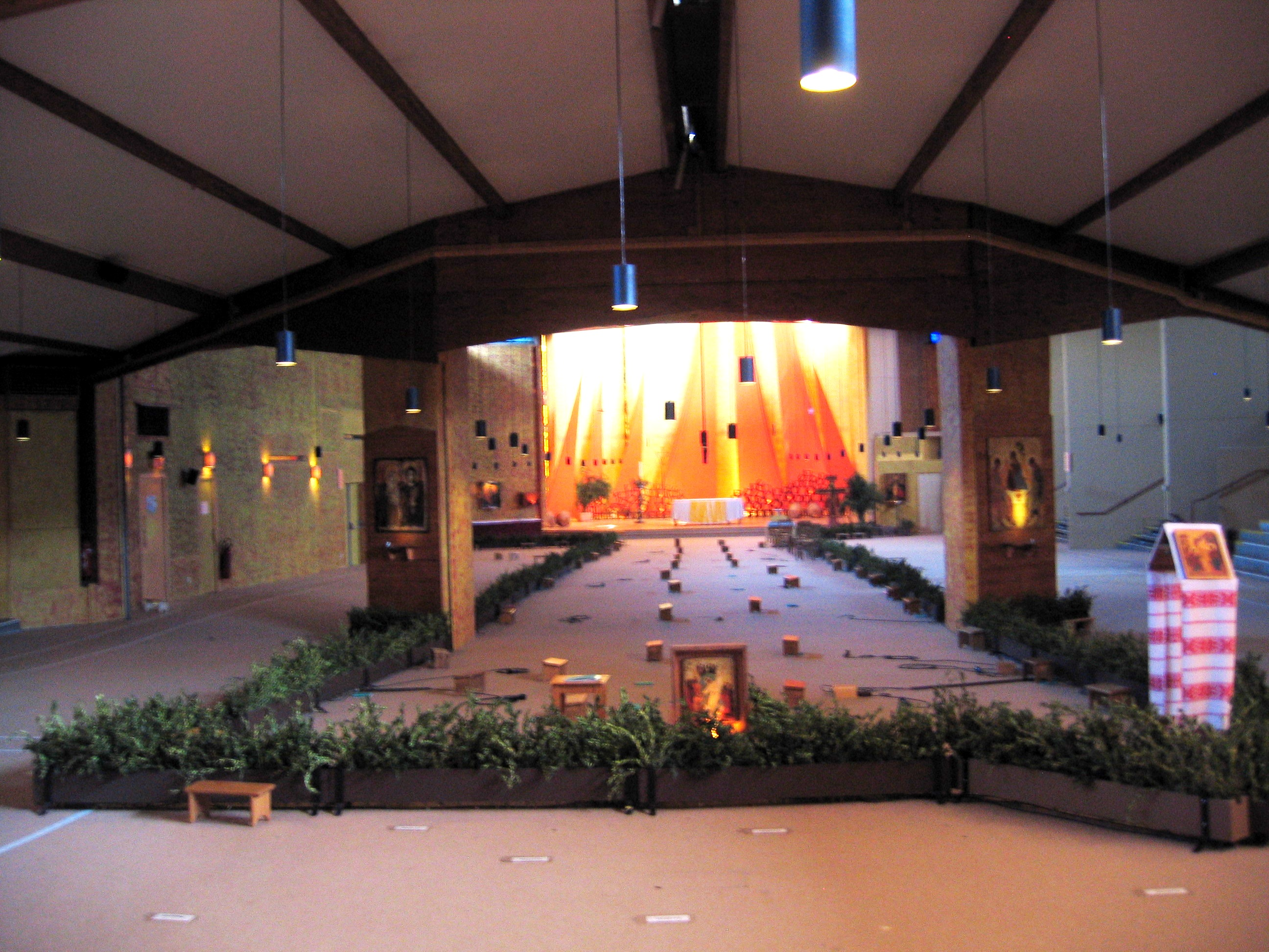 Bourgogne Taize Eglise Reconciliation 10052011